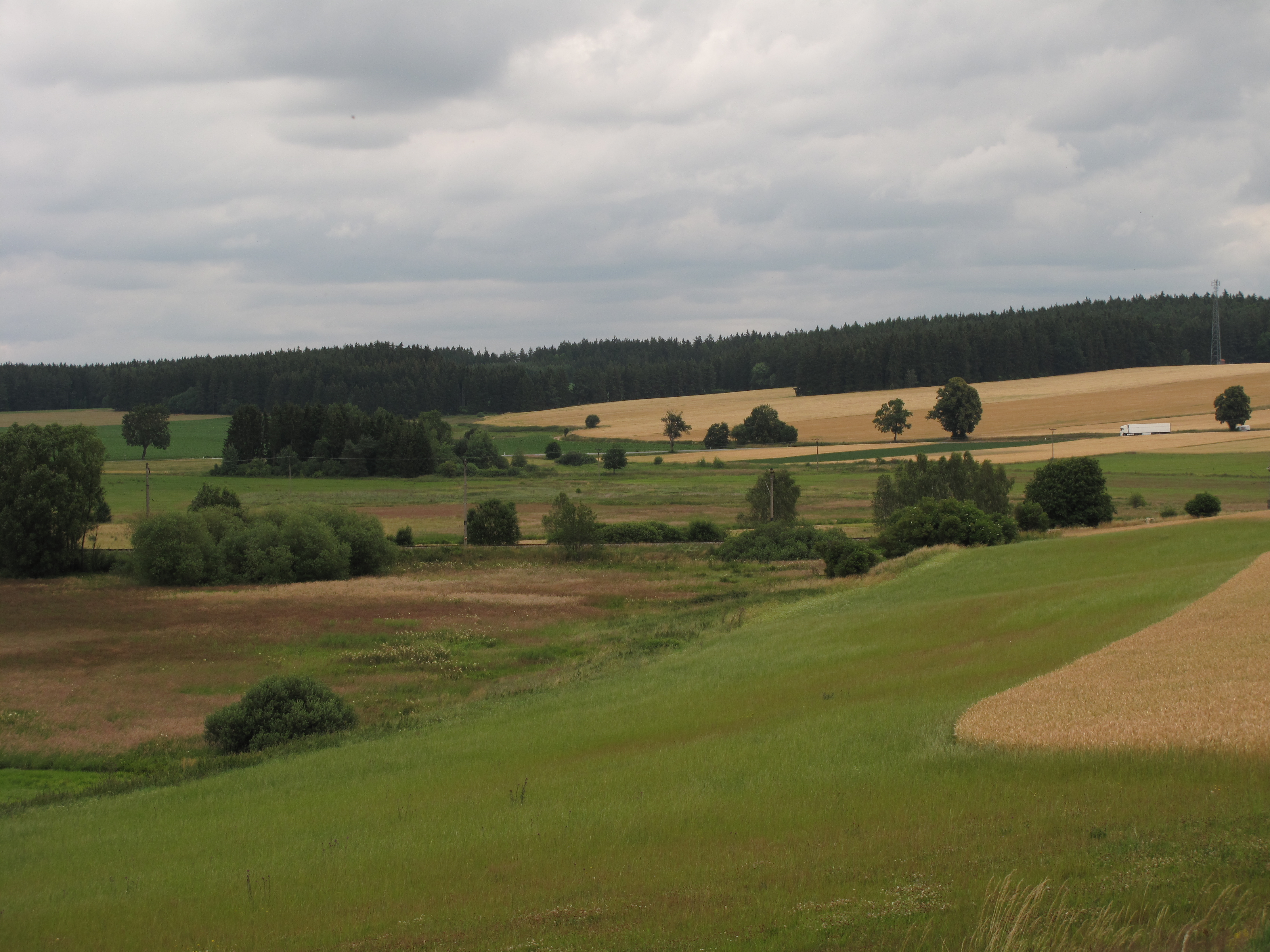 Přírodní rezervace U potoků. Okres Jihlava, Česká republika.